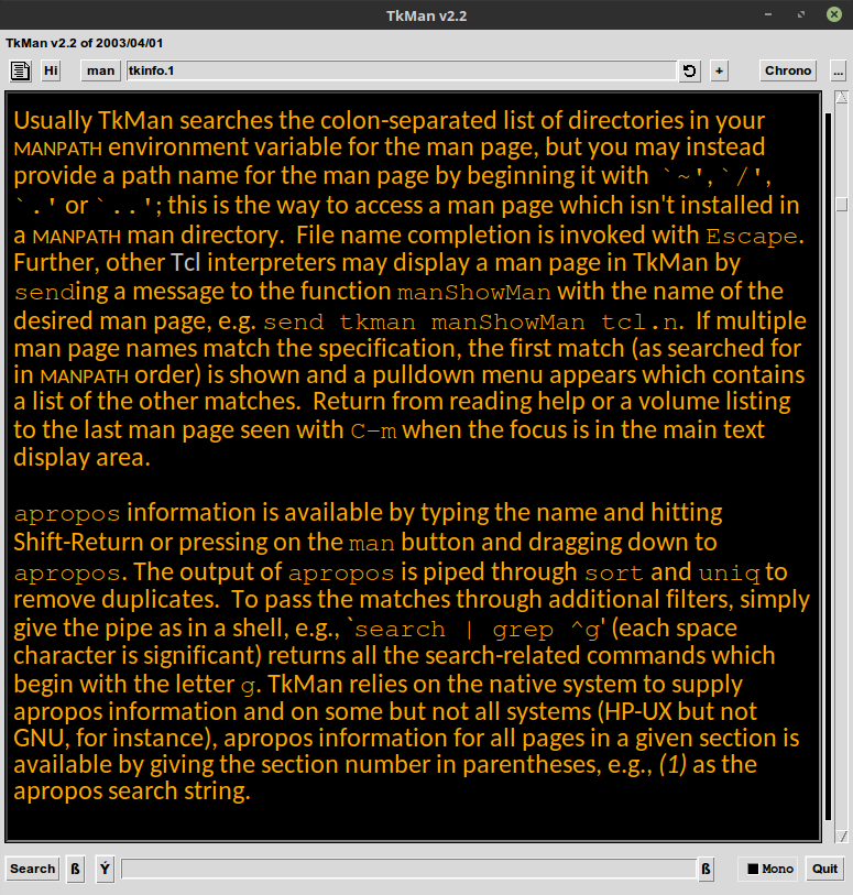 Ein Bildschirmfoto des Manpage-Viewers TkMan, in dem die Integration des Kommandos apropos in TkMan beschrieben wird.